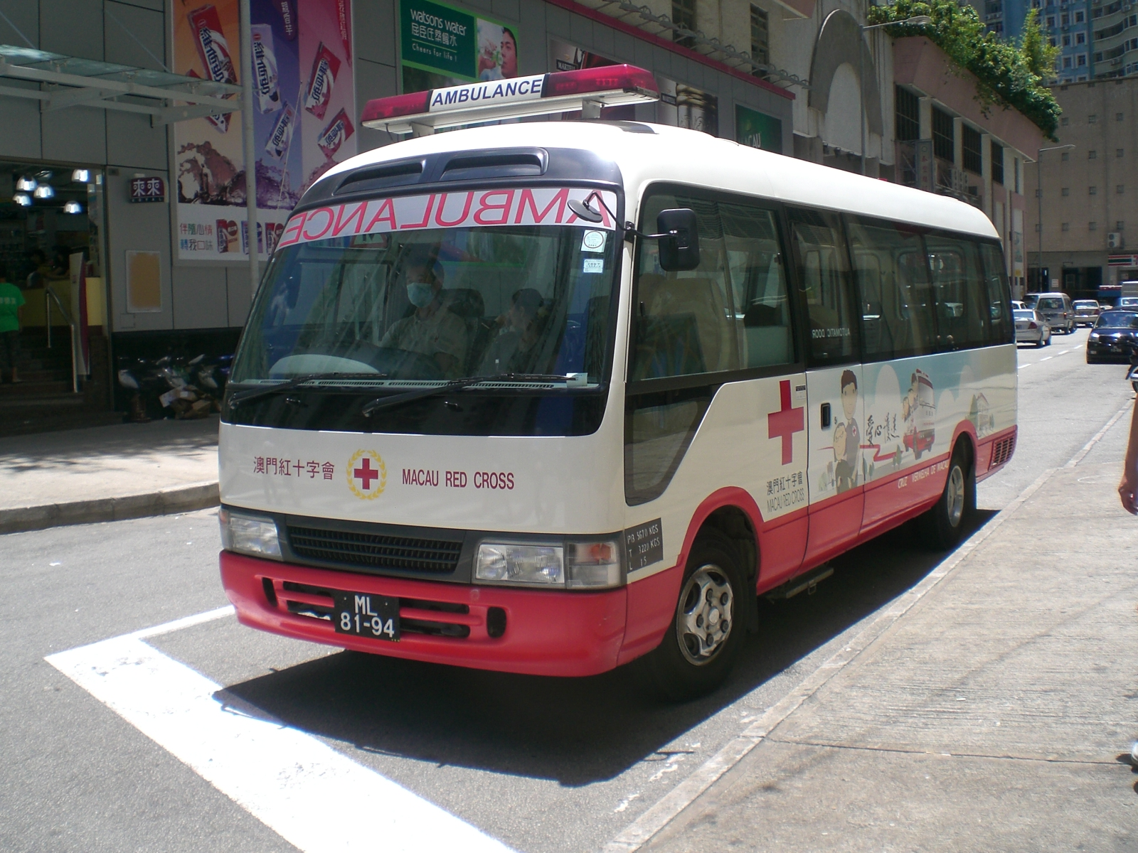 澳門紅十字會救護巴士